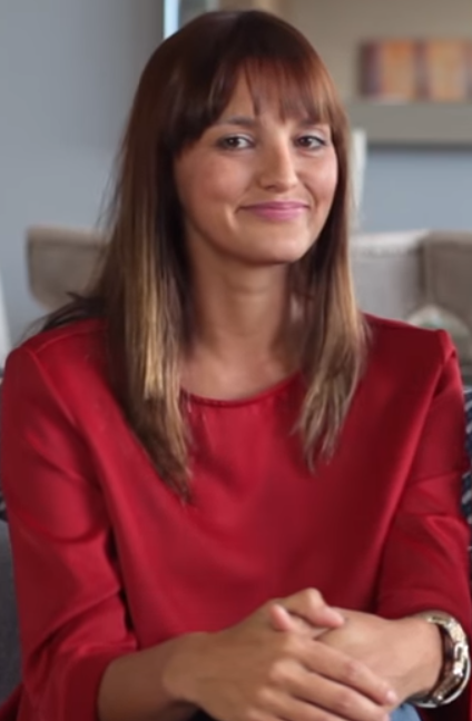 Nina Rodríguez en 2017